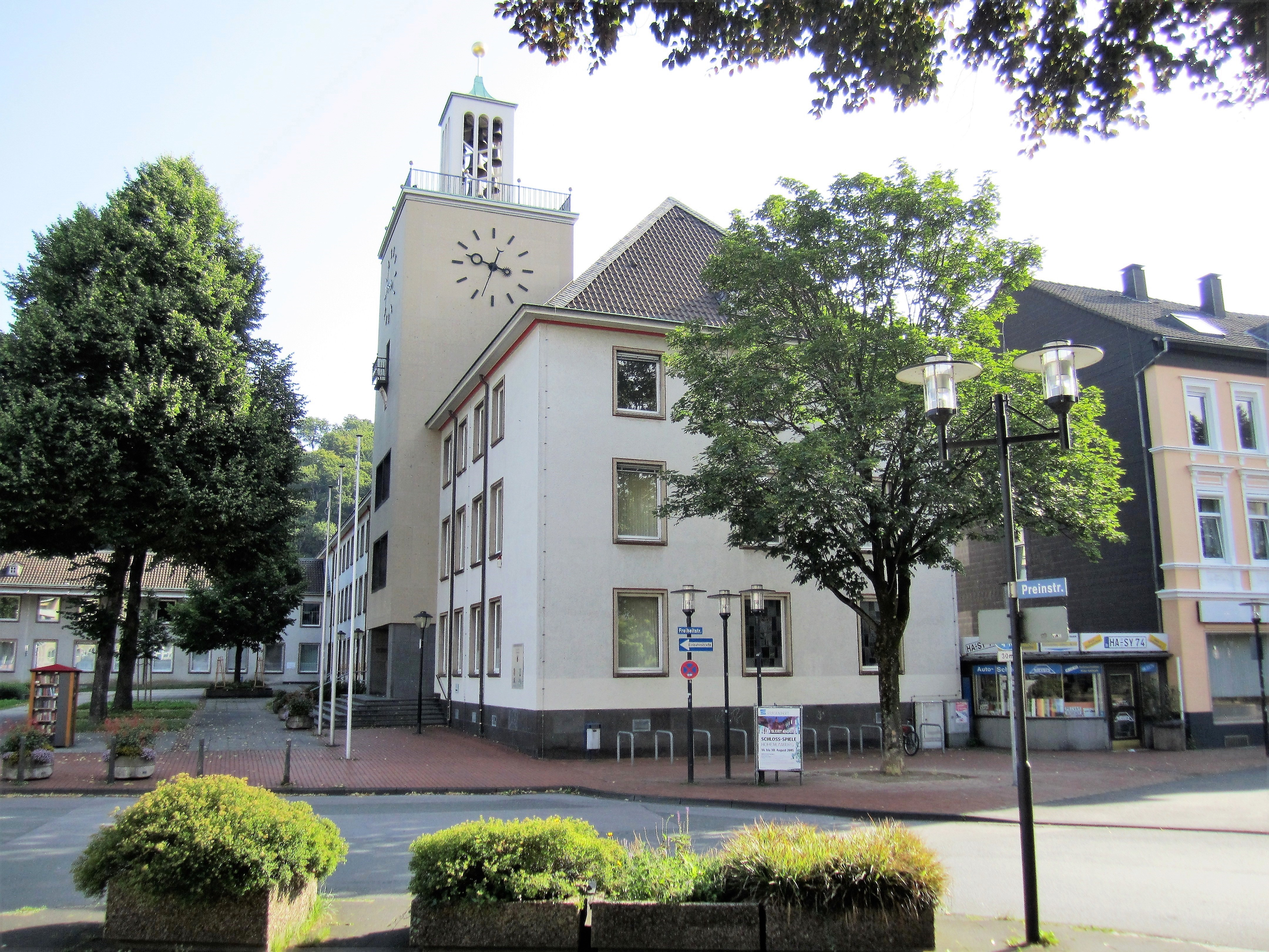 Verwaltungsgebäude in Hagen-Hohenlimburg, Freiheitstraße 1-3. Grundsteinlegung des Hohenlimburger Rathauses war am 20. Juni 1954; feierlich eingeweiht in der Amtszeit von Bürgermeister Paul Knapp am 7. Januar 1956. Architekt war Carl H.J. Schmitz aus Schwerte. Attraktion des Hohenlimburger Rathauses ist das Glockenspiel mit 25 Glocken, das vom Rathausturm dreimal täglich, oder zu besonderen Anlässen erklingt. Heute Bezirksvertretung, Bürgeramt, Polizeiwache Hohenlimburg sowie Zulassungsbehörde der Stadt Hagen.